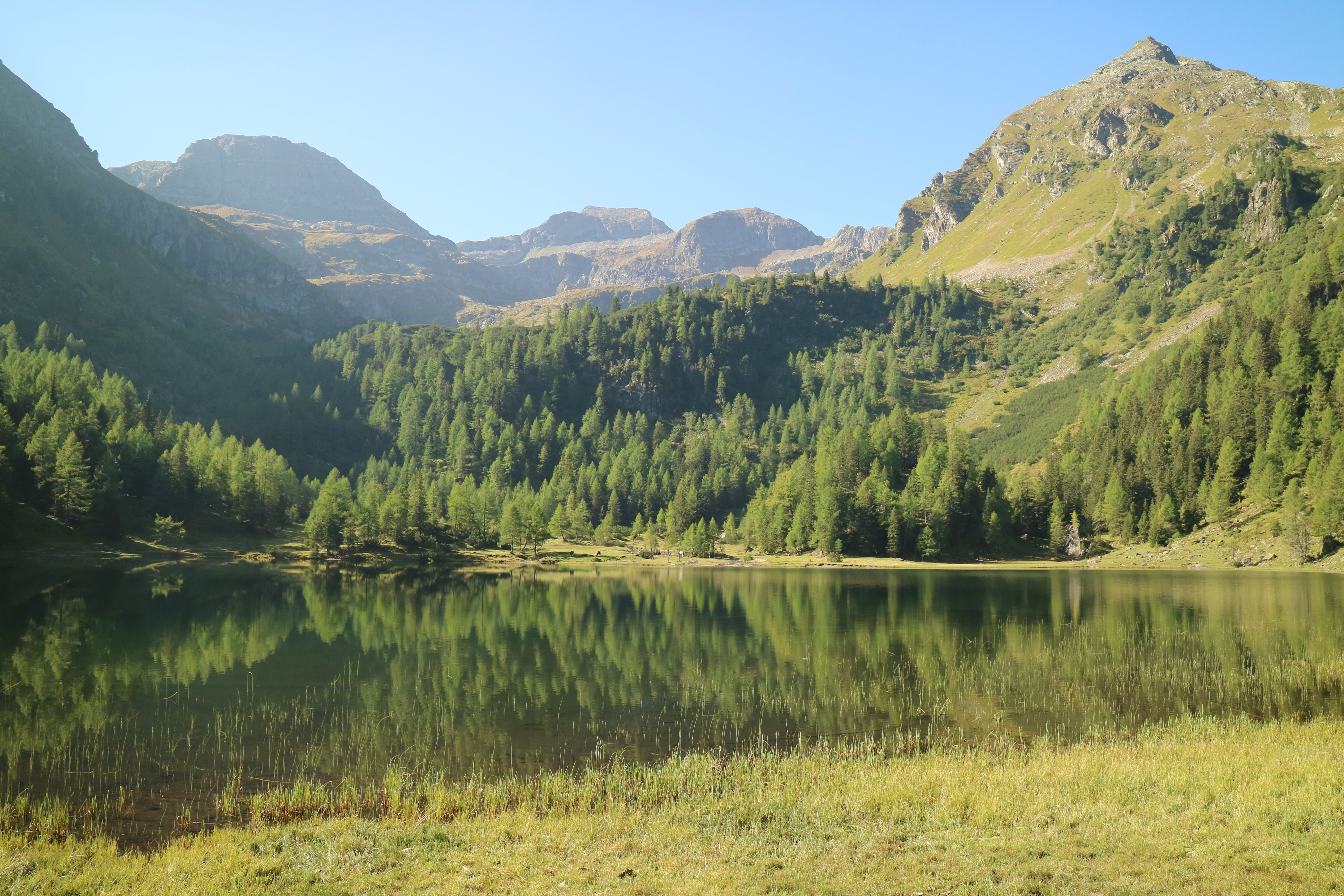 Duisitzkarsee mit Kruckeck, Sauberg, Rotmandlspitze und Murspitzen